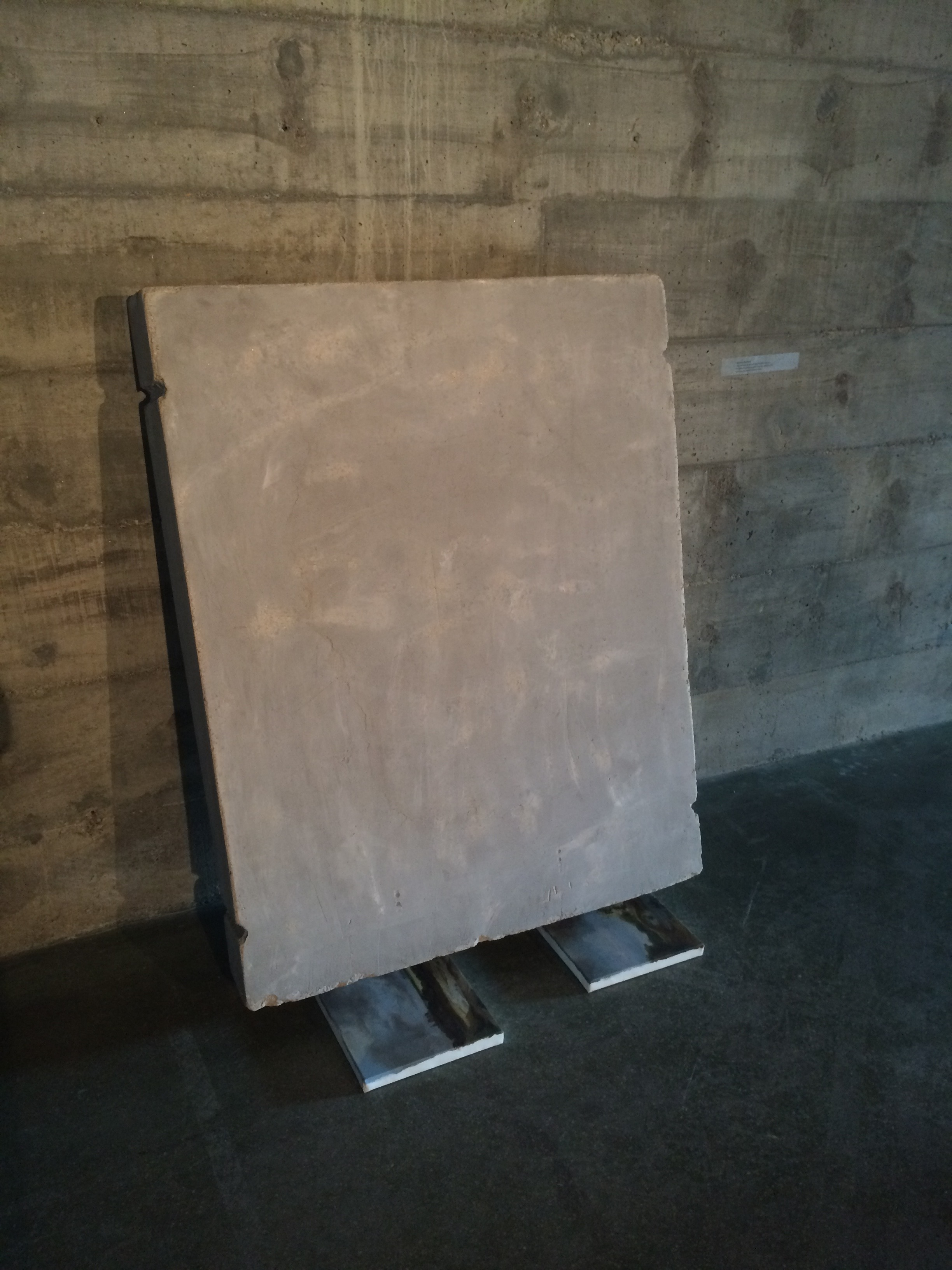 Obra de Amilcar de Castro no Museu Brasileiro da Escultura, exposição de Paulo Mendes da Rocha